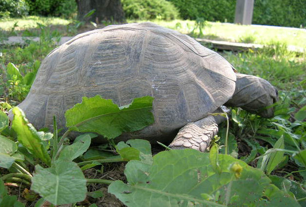 Testudo graeca, Lombardia, Italia